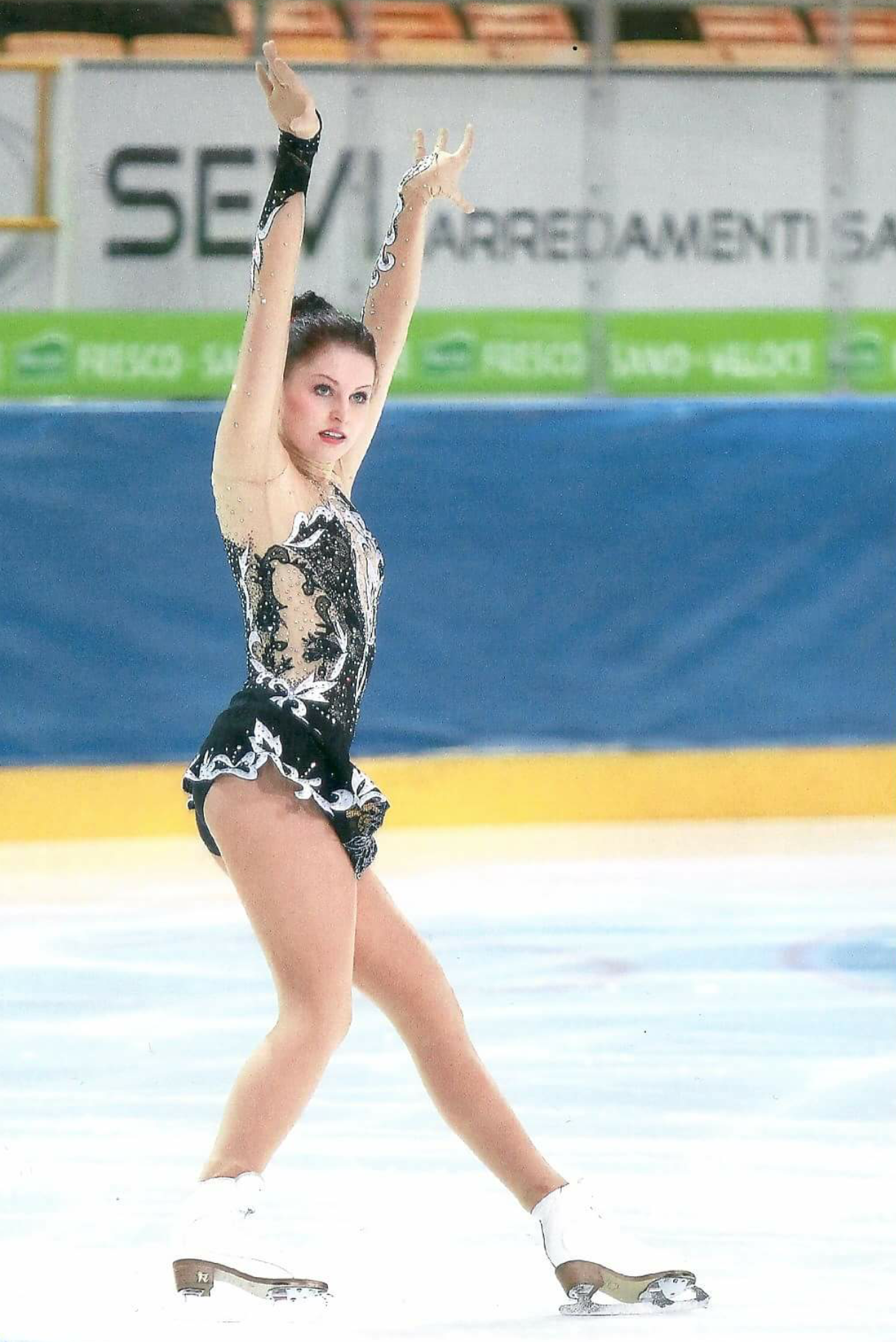 Christina Niederer an der Schweizermeisterschaft 2015